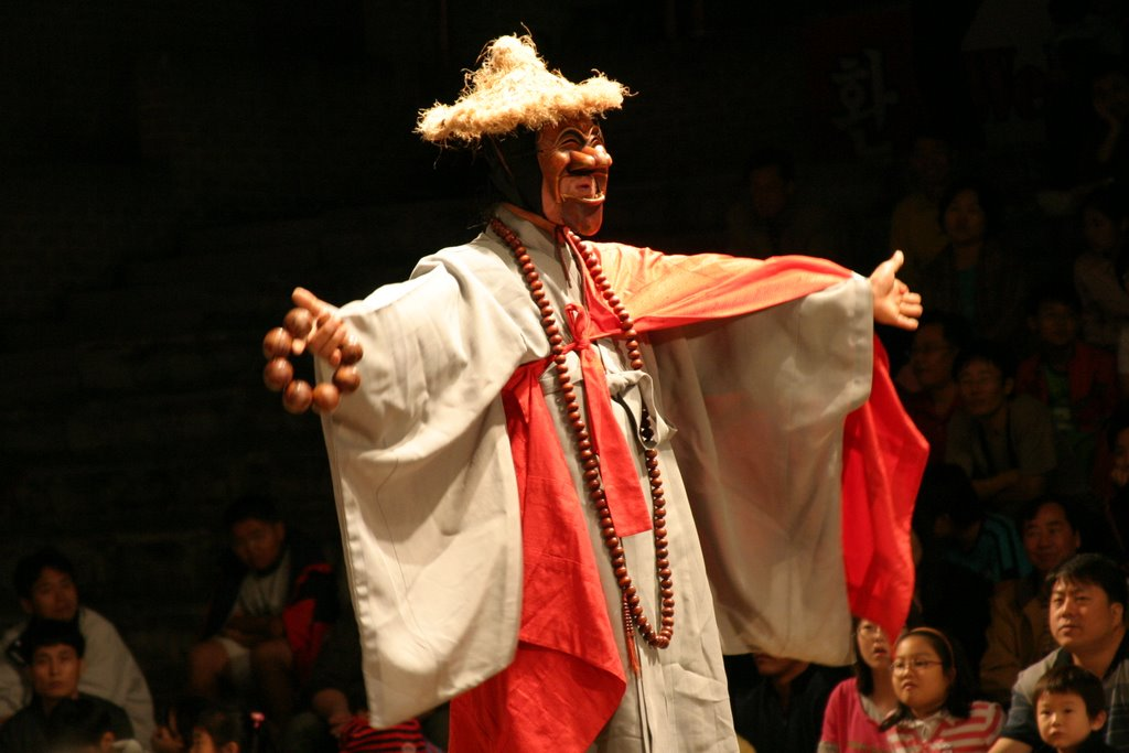 Hahoe Folk Village in Andong, Gyeongsangbuk-do, South Korea.